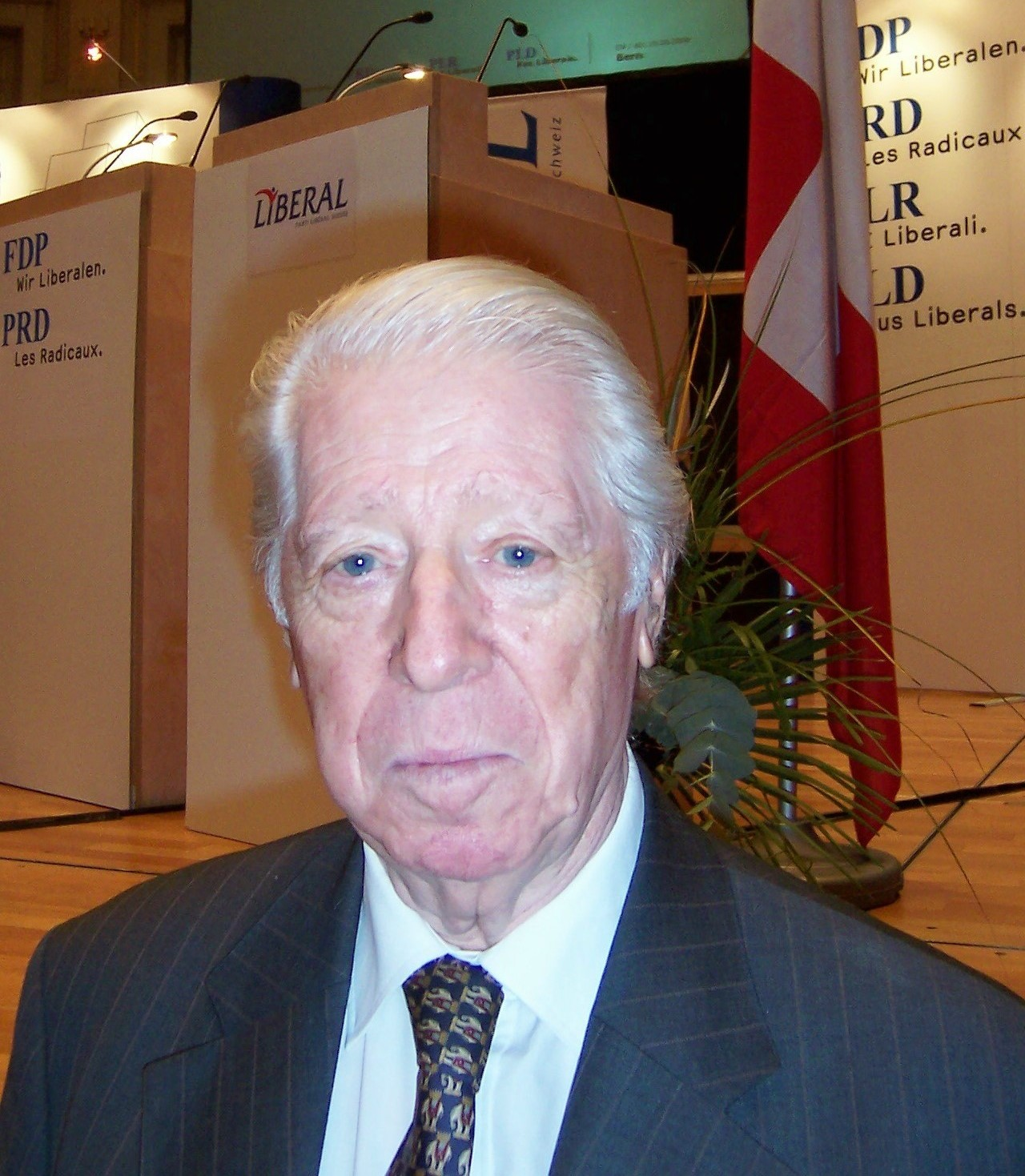 Jean-Jacques Cevey an der gemeinsamen Delegiertenversammlung der Freisinnig-Demokratischen Partei und der Liberalen Partei der Schweiz zur Gründung der Fusionspartei «FDP. Die Liberalen» in Bern.